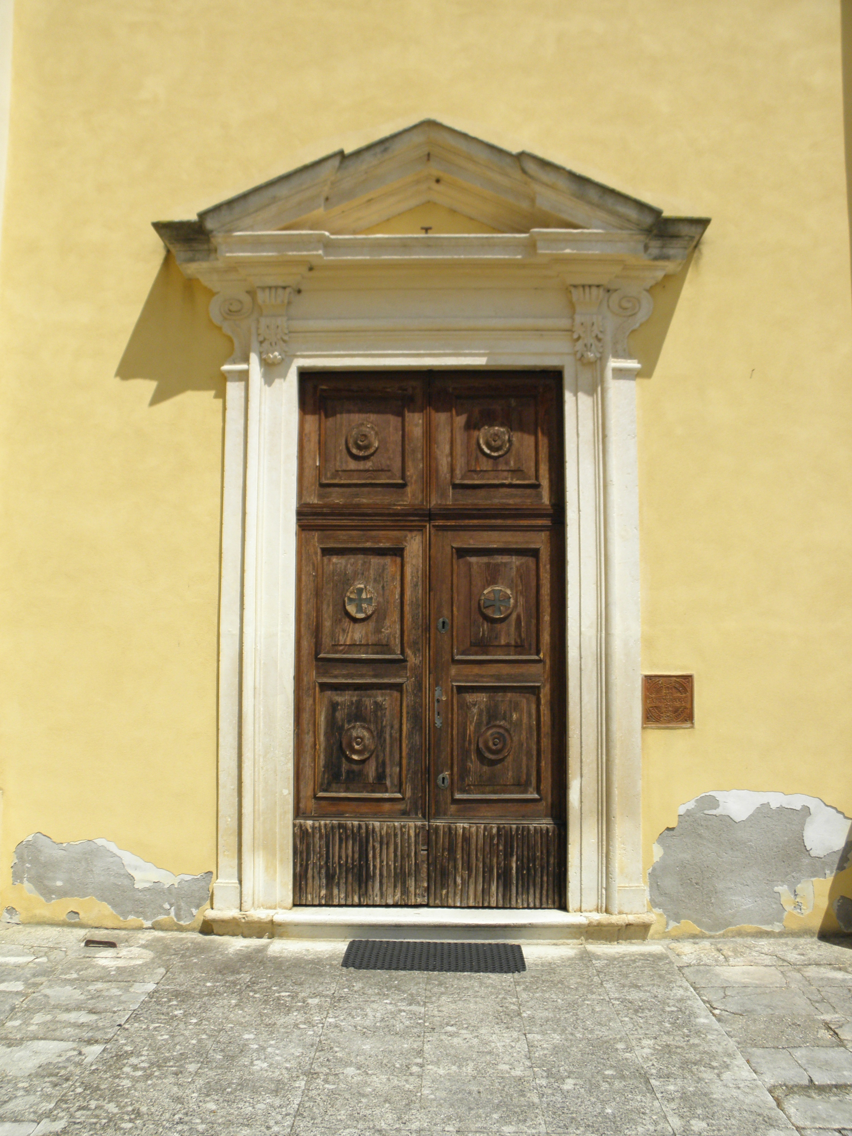 San Germano dei Berici, già comune autonomo e ora frazione di Val Liona: il portale della chiesa parrocchiale di San Germano.